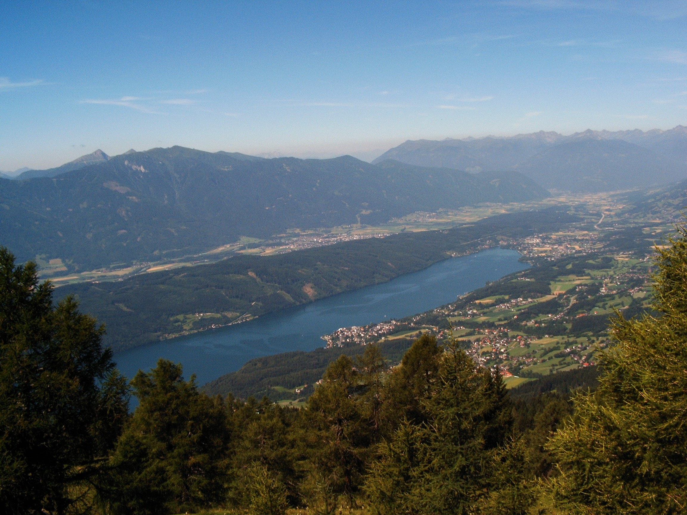 Der Millstätter See in Kärnten / Österreich, fotografiert vom Juffen oberhalb der Lammersdorfer Hütte. In Bildmitte am See Millstatt, am Millstätter Berg rechts davon Obermillstatt, etwas weiter hinten Seeboden und hinter dem Seerücken Spittal / Drau.